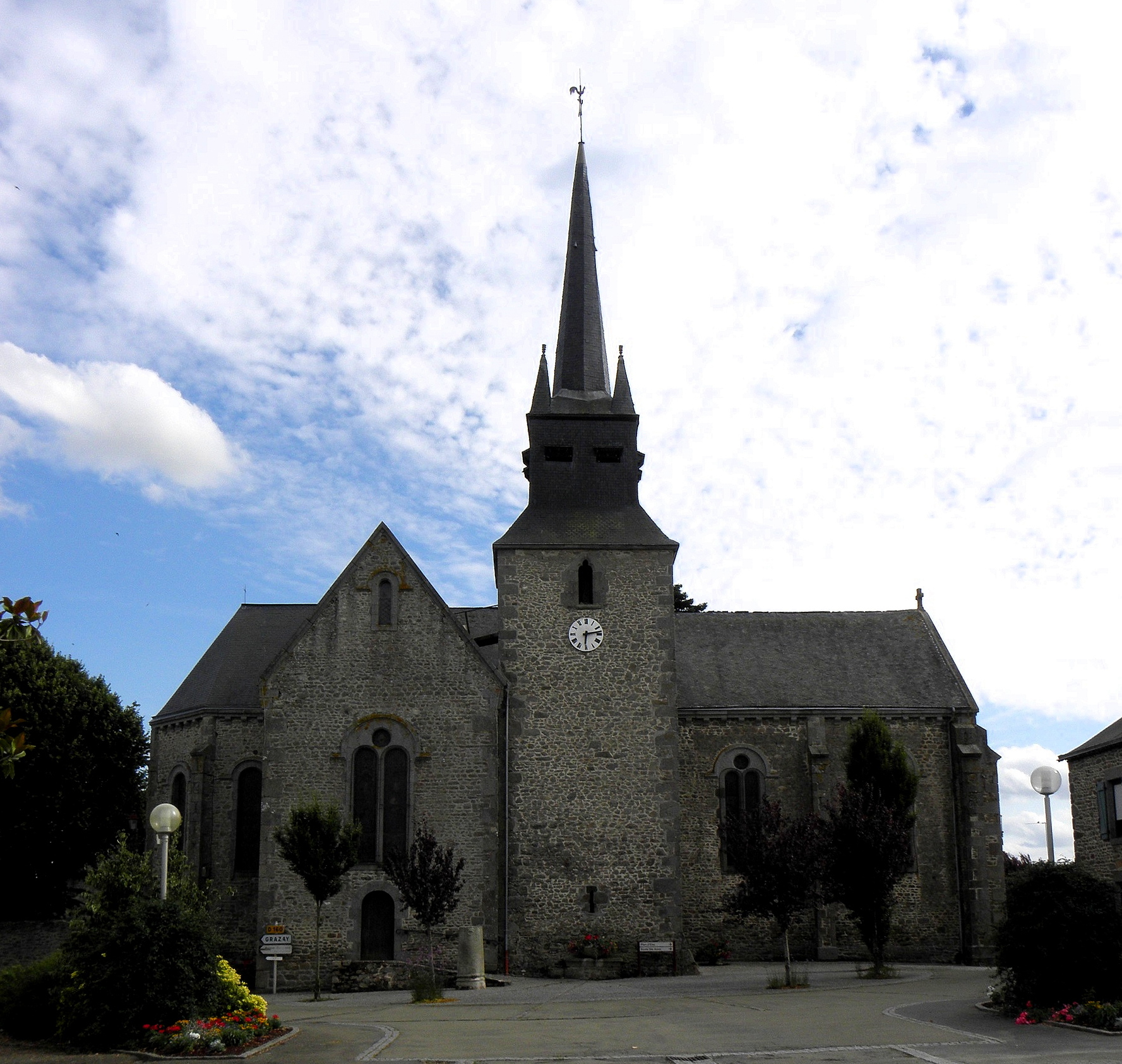 Église Saint-Martin de Marcillé-la-Ville (53).